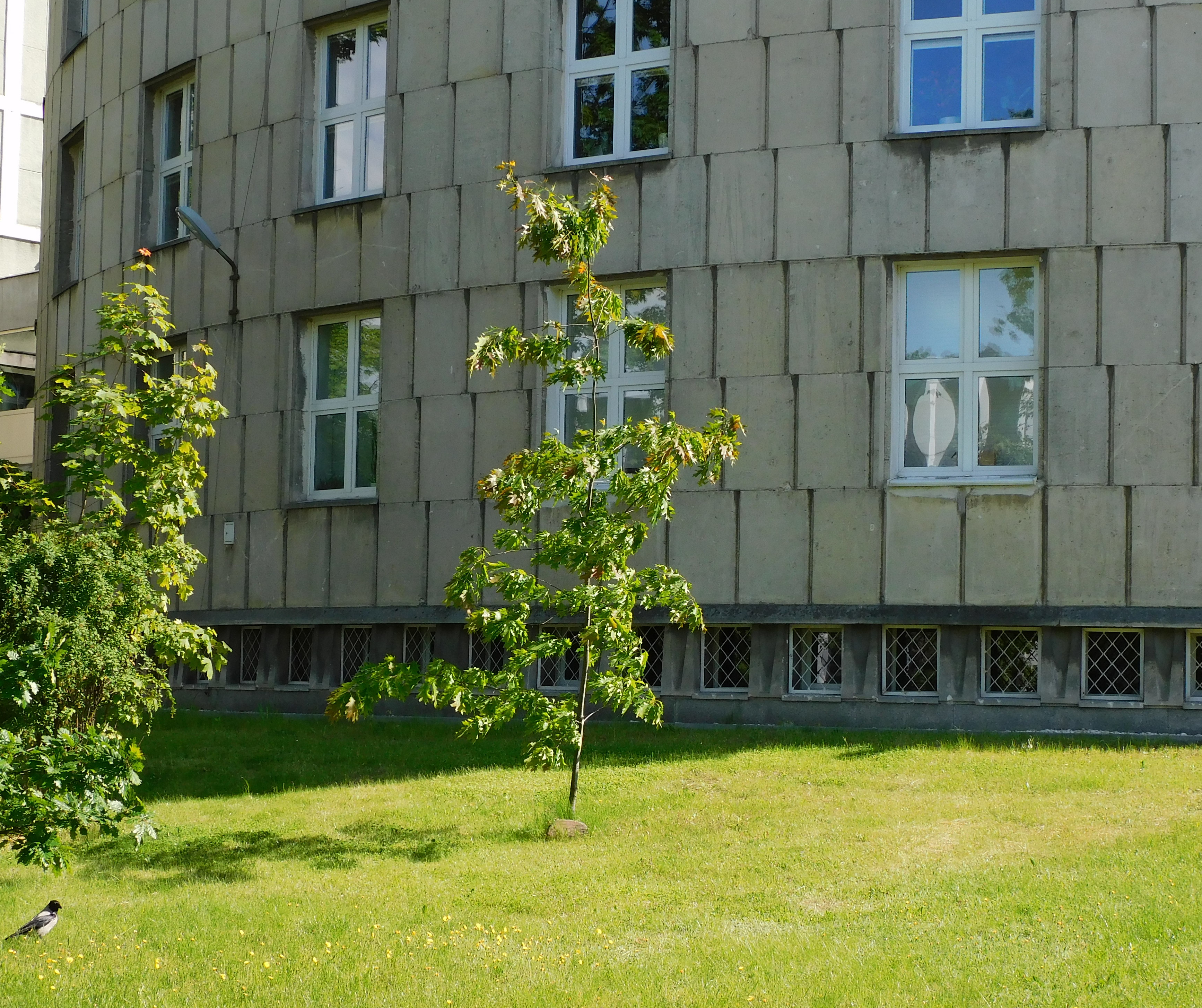 Dąb pamiątkowy Jerzy posadzony w 2015 przed Archiwum Akt Nowych w Warszawie dla upamiętnienia Jerzego Skowronka